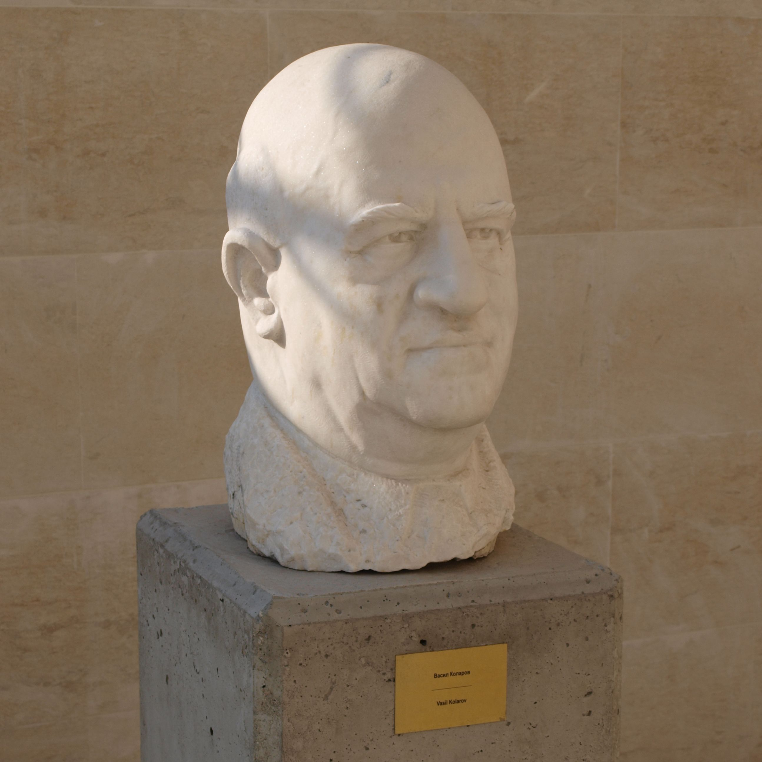 Museum of Sozart 1Скулптури в парка на Музея на социалистическото изкуство в София - Васил Коларов.